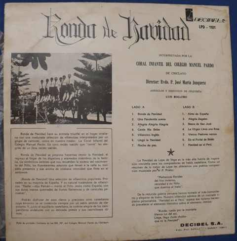 Ronda de Navidad del Coro Infantil del Colegio Manuel Pardo